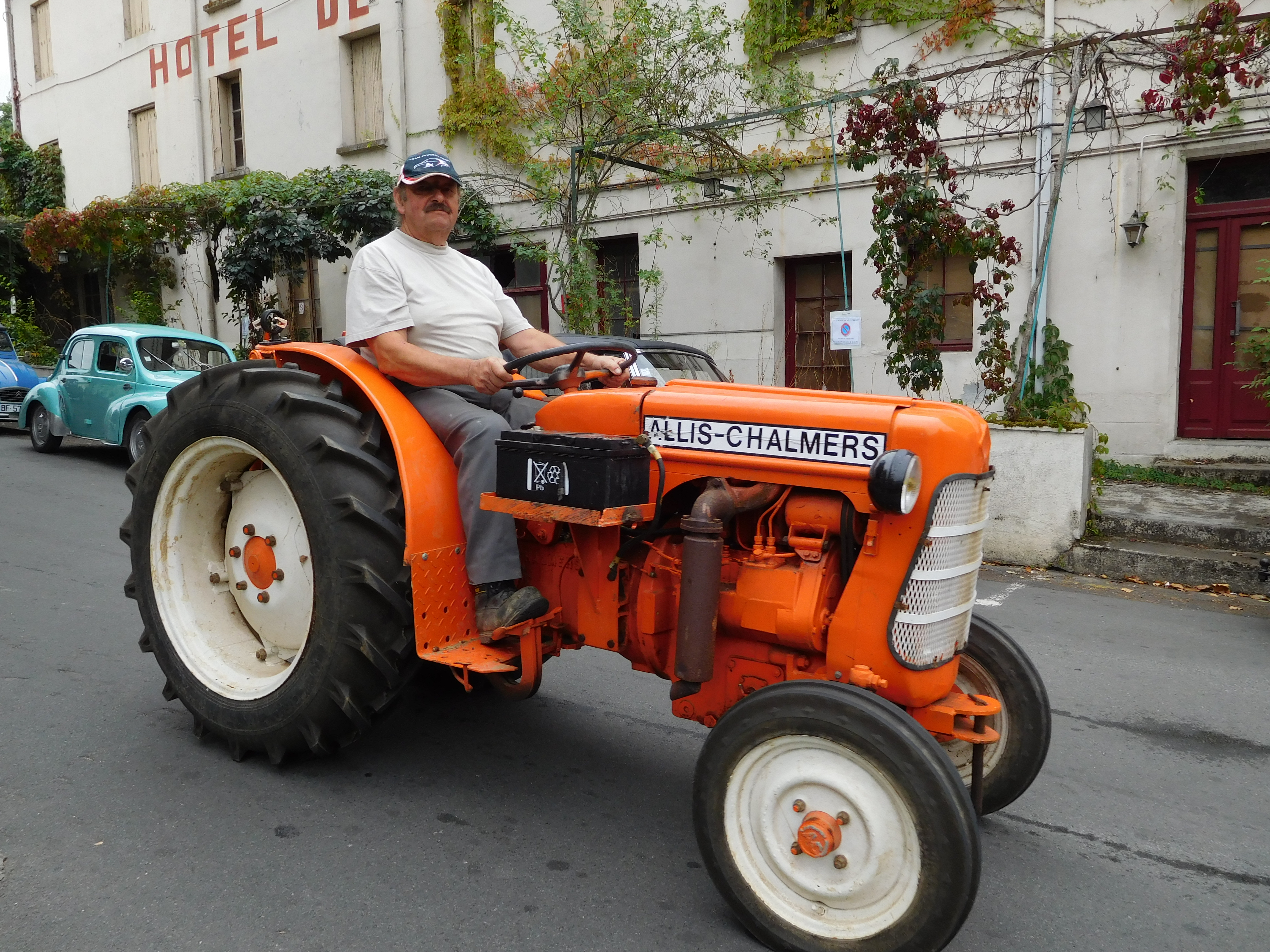 Tracteur vigneron Allis-Chalmers FD3 de 1957, moteur Vendeuvre 2,5 l Diesel, bicylindre refroidi par air, 24 ch.